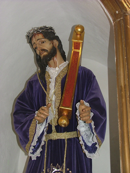 Imagen de Jesus Nazareno de la iglesia de Guájar Faragüit (Granada), realizada por Antonio Cano en 1939.